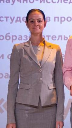 В последний день осени состоялась торжественная церемония награждения победителей XX областного конкурса научно-исследовательских работ студентов Свердловской области, «Научный Олимп».